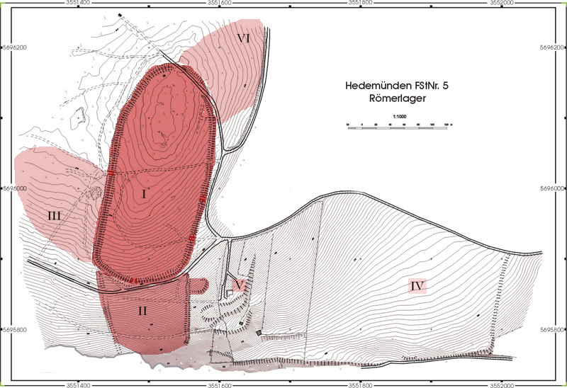 Gesamtplan des Römerlagers Hedemünden